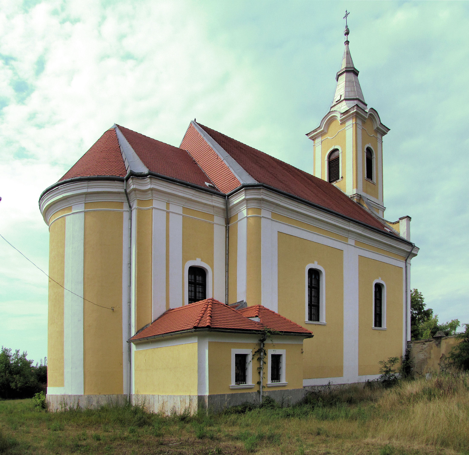 Előszállási római katolikus templom